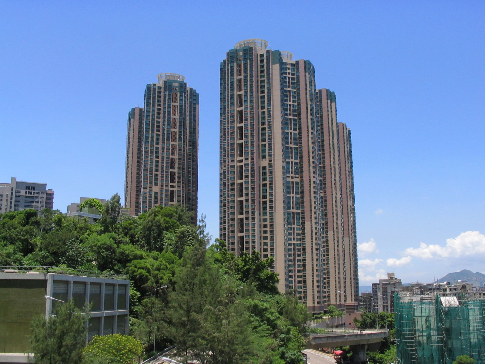 寶翠園 The Belcher's